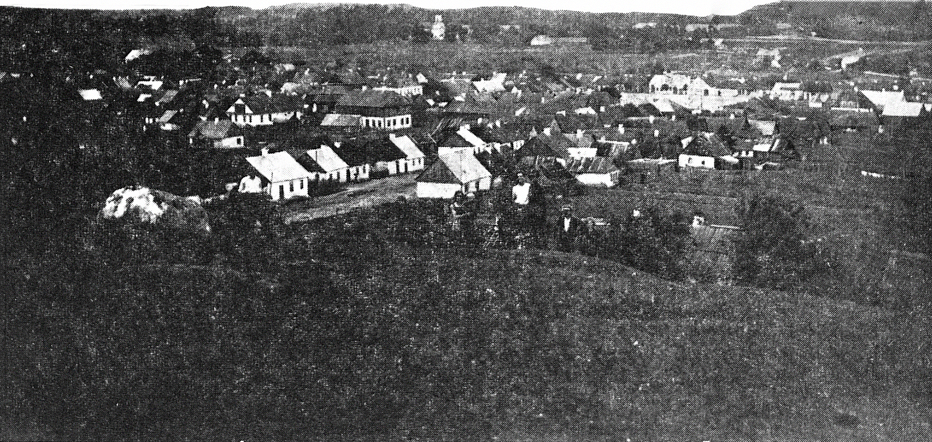 Беларуская (тарашкевіца): Сапоцкін (Sapockin)